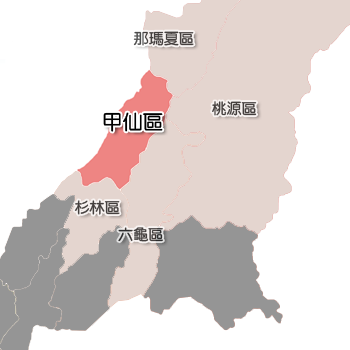 高雄市甲仙區相對位置。